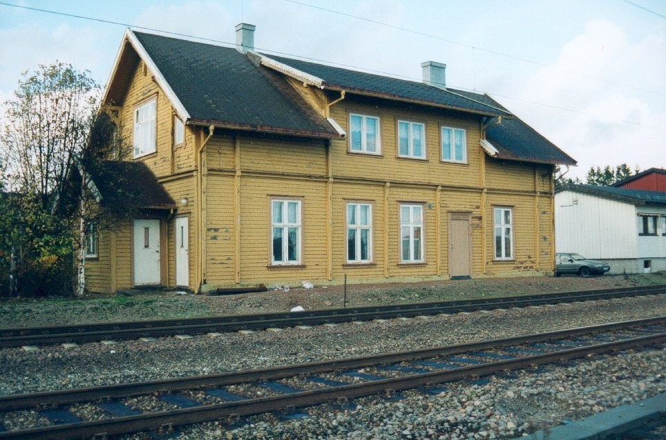 Sem stasjon på Vestfoldbanen. Tønsberg (tidl. Sem) kommune, Vestfold, Norge.